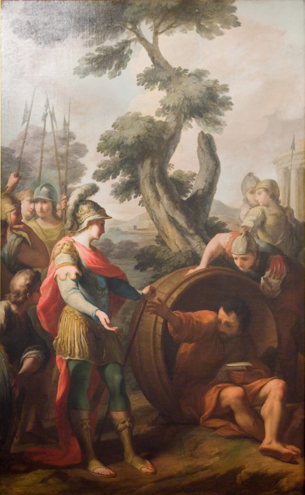 Беседа Александра Македонского с Диогеном. Холст, Масло. Ж-3142. Русский Музй, Михайловский замок.